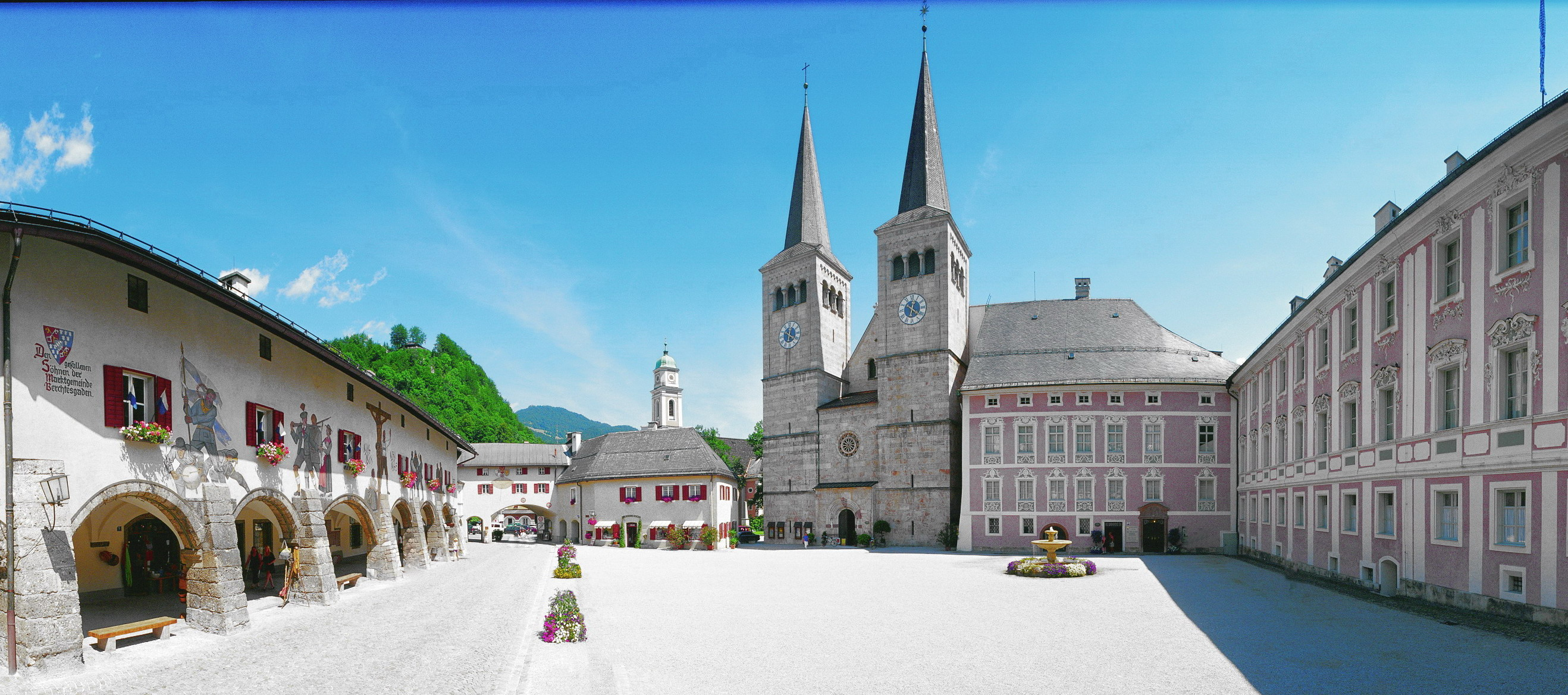 180°-Ansicht des Berchtesgadener Schlossplatzes mit Stiftskirche und Königlichem Schloss